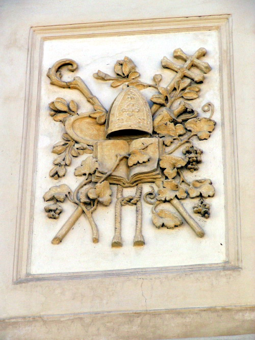 Asti, facciata della Chiesa SS Trinità.part.